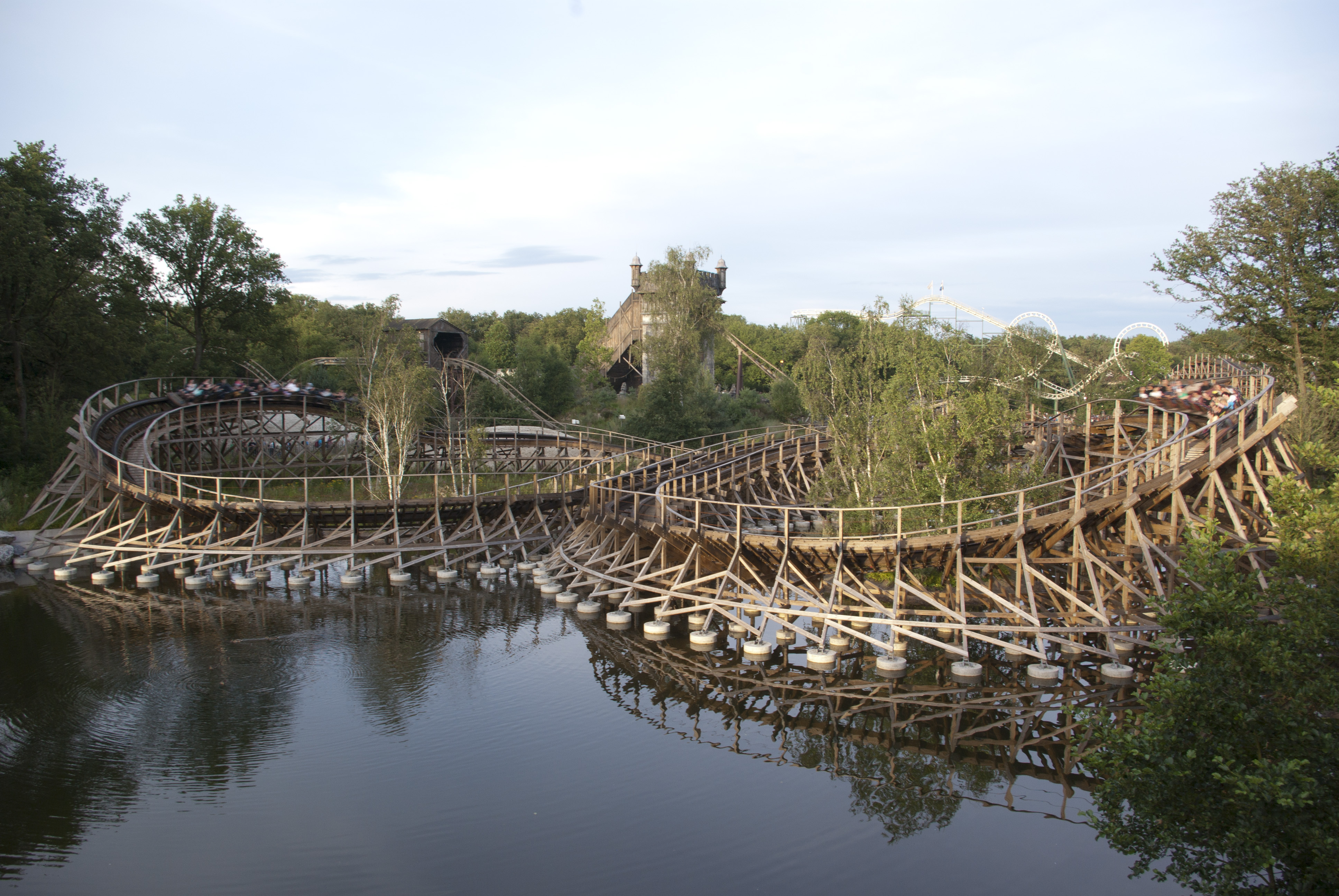 Drie van de vele attracties van De Efteling.